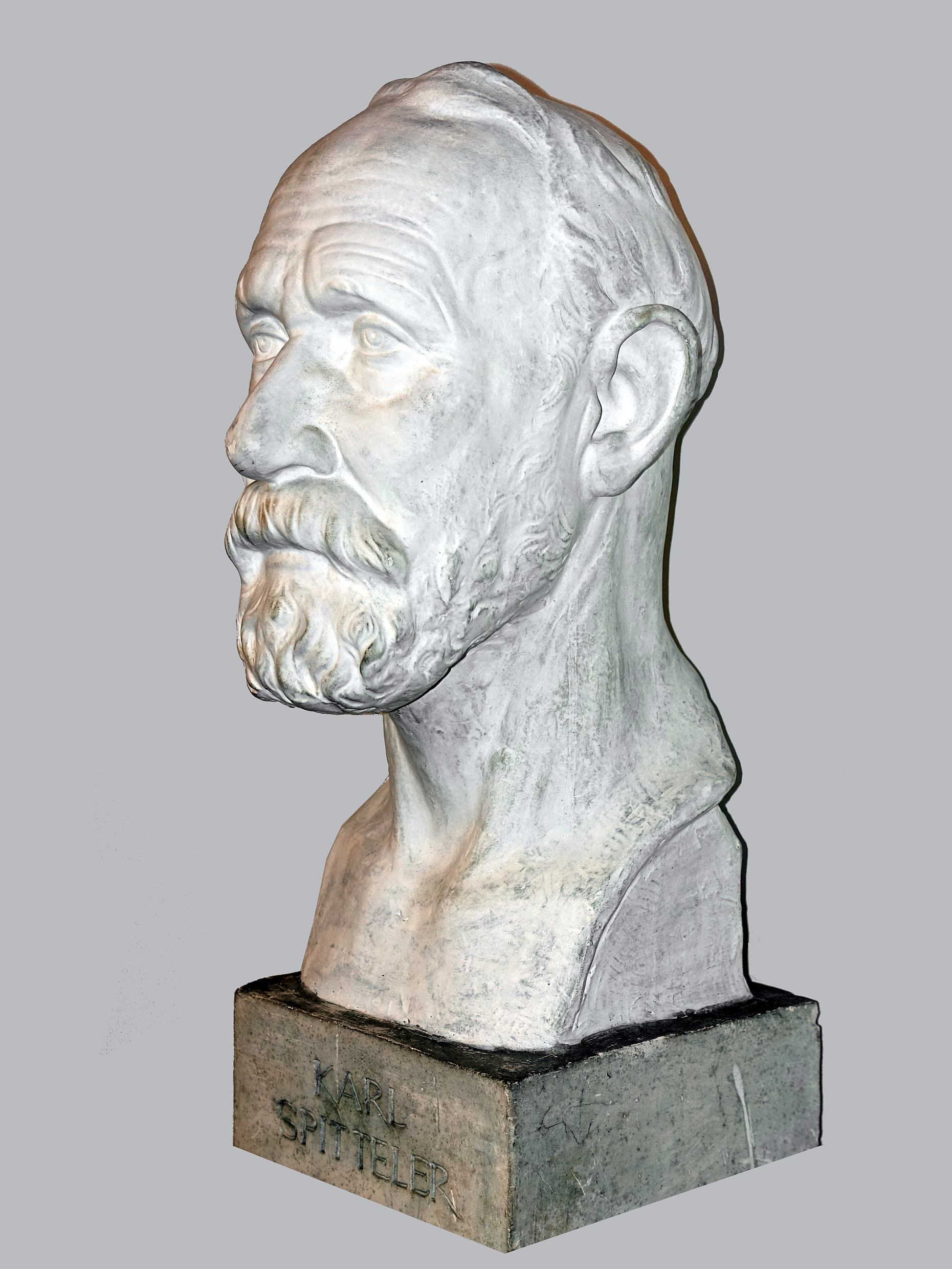 Jakob August Heer (1867-1922) , Gips Büste von Carl Spitteler (1845-1925) Schriftsteller, Dichter in Liestal, Schweiz